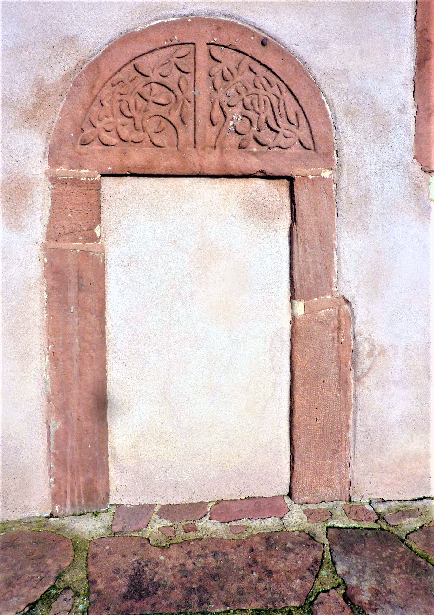 Église Saint-Arbogast (Bourgheim)